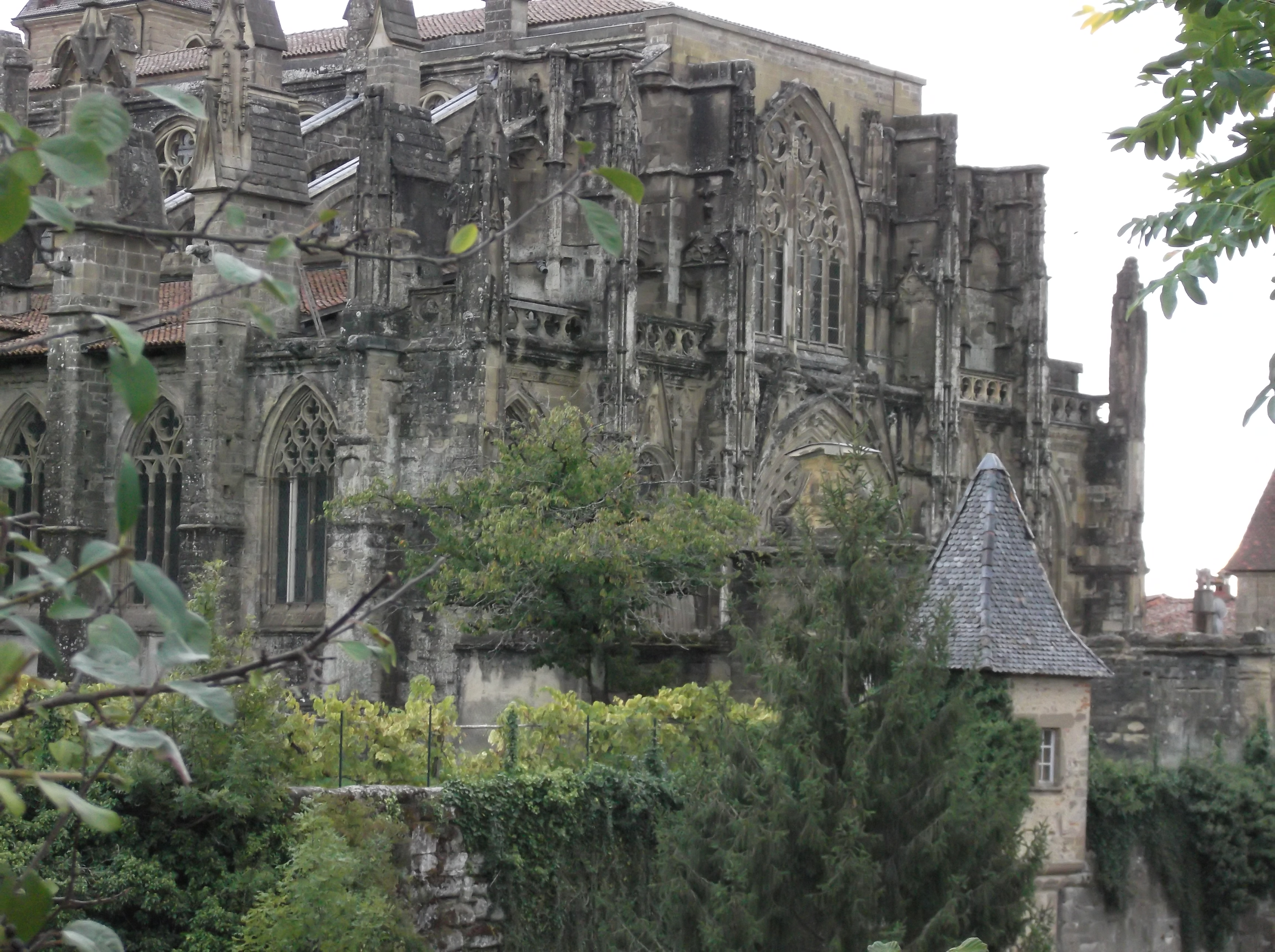 Église Notre-Dame de la Jayère _Eglise Saint-Antoine-l'Abbaye 38160 PA38000020 VAN DEN HENDE ALAIN CC -BY-SA 4 0 02044 .